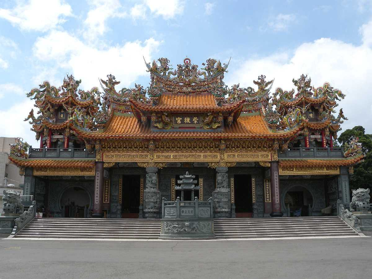 嘉義市大溪厝紫微宮